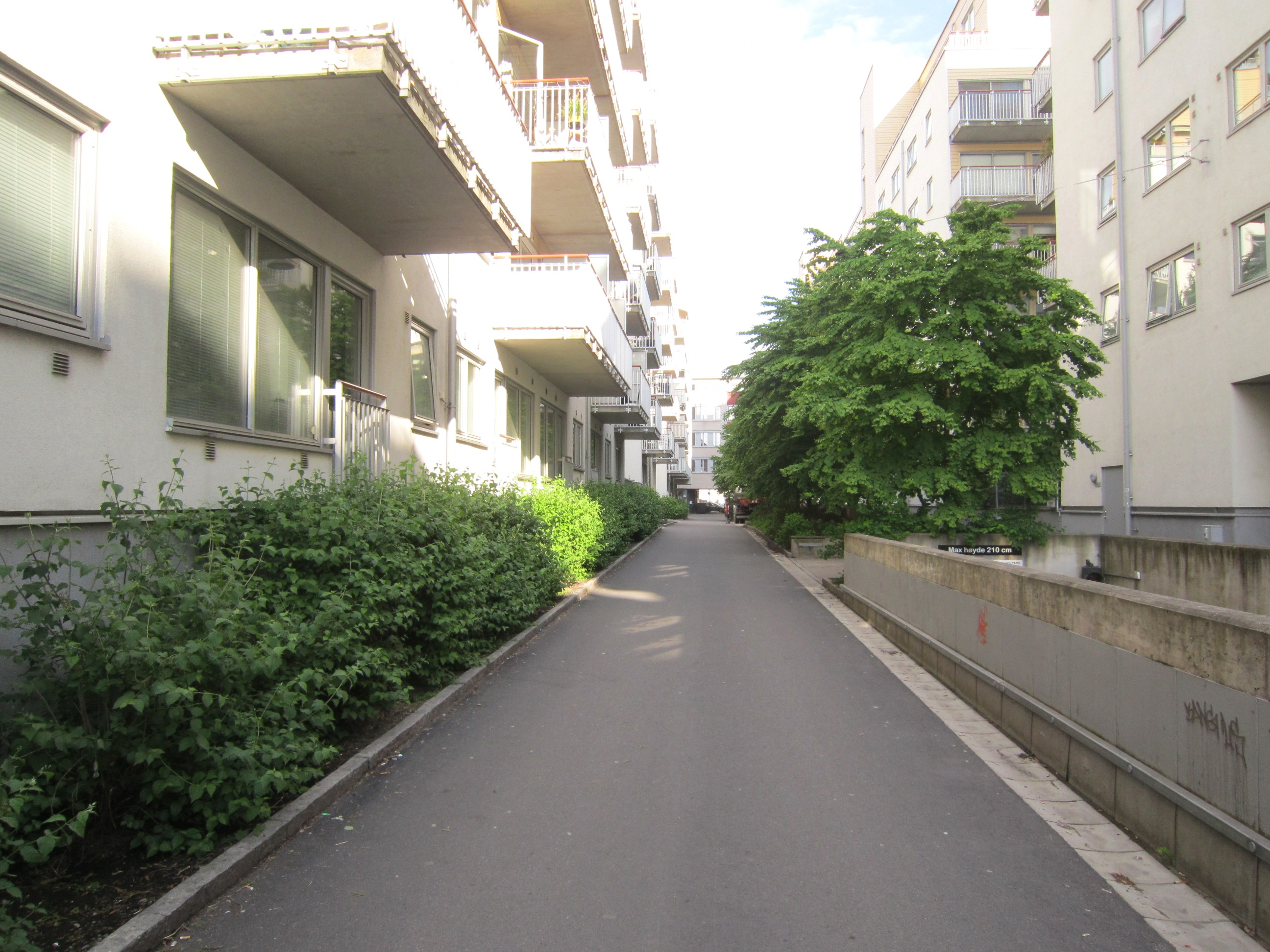 Rubina Ranas gate på Grønland i Oslo